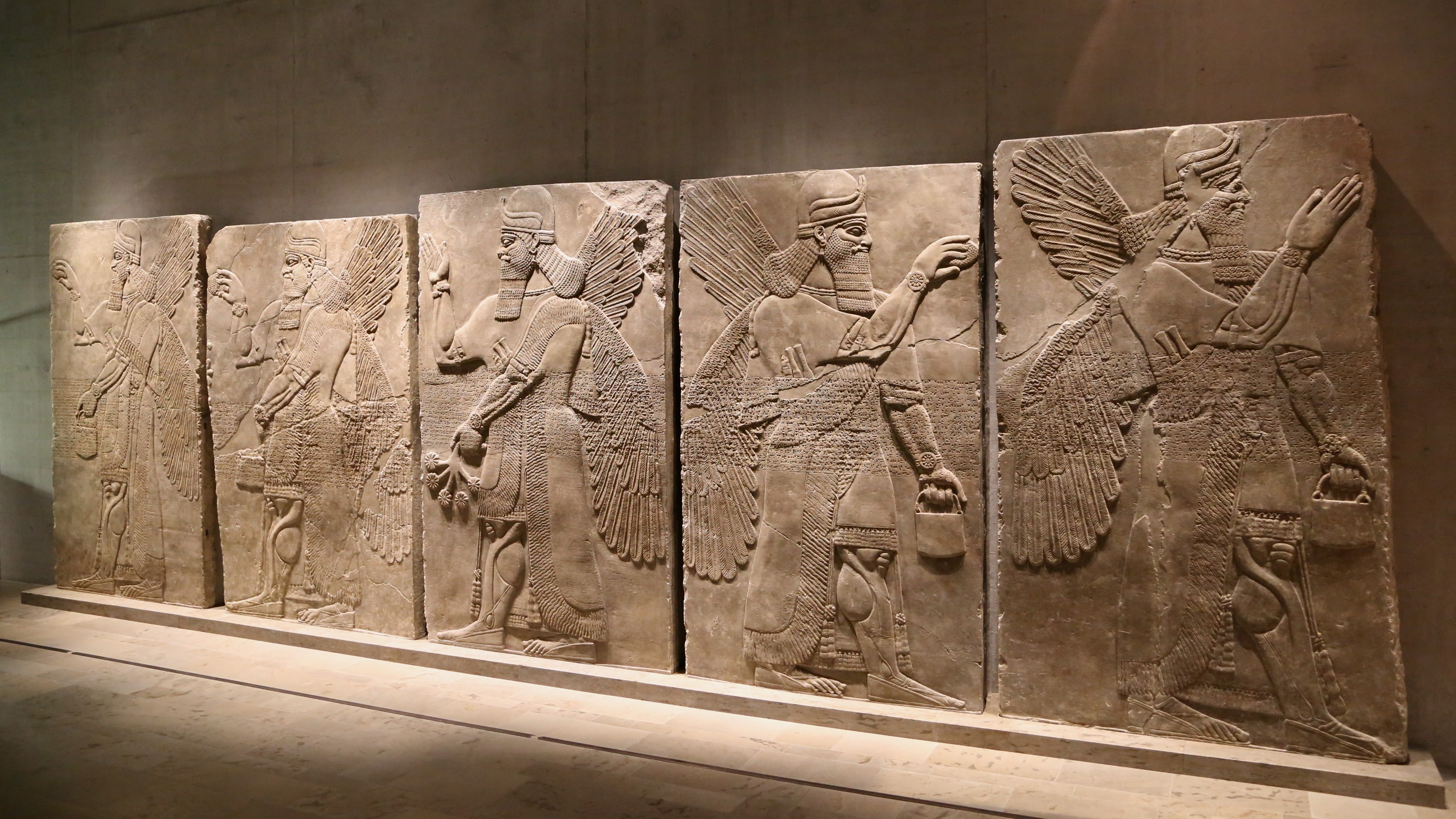 Geflügelte bärtige Genien mit verschiedenen Attributen, Nimrud, Nordwestpalast des Königs Assurnasirpal II., um 870 v. Chr., Mossulalabaster